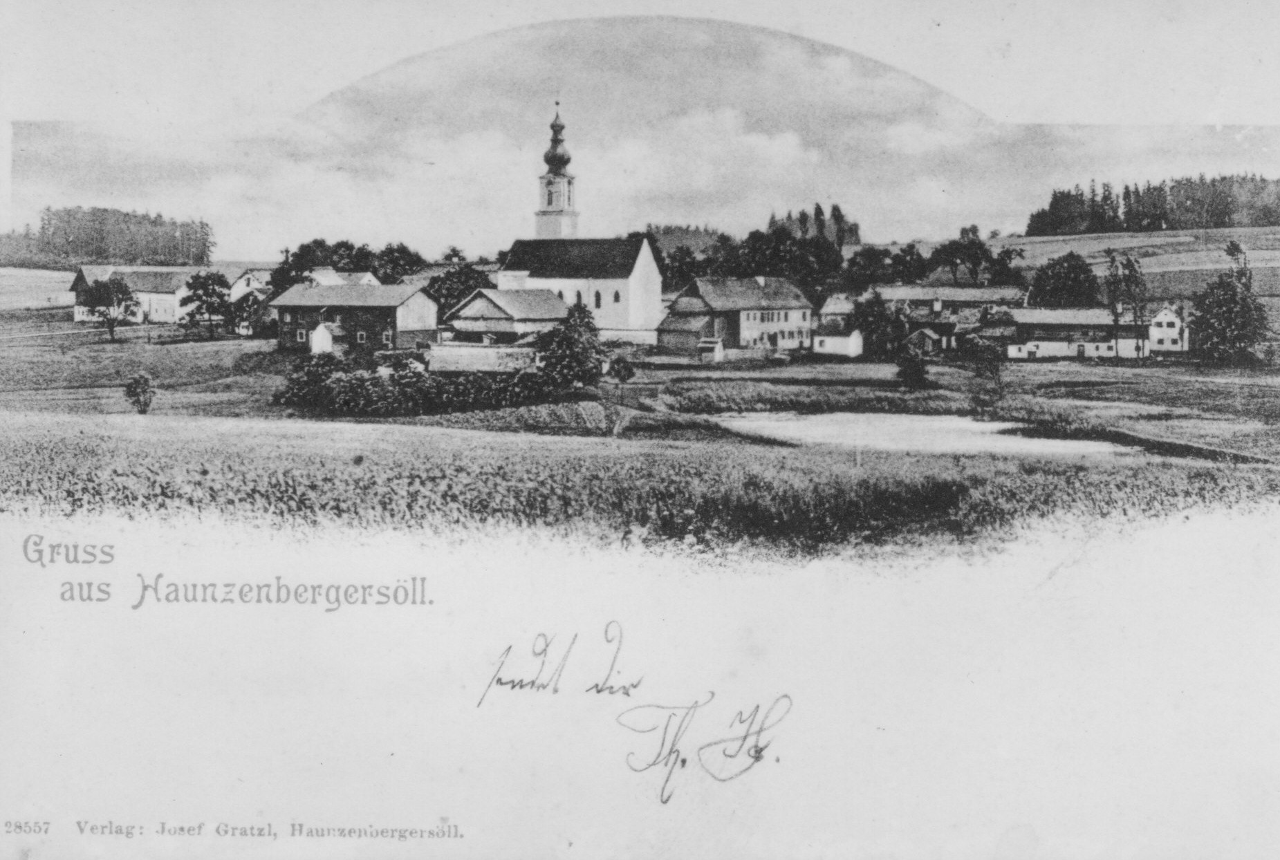 Haunzenbergersöll 1916 Postkarte Ansichtskarte Gruß Dorf Zeichnung Kirche Pfarrkirche